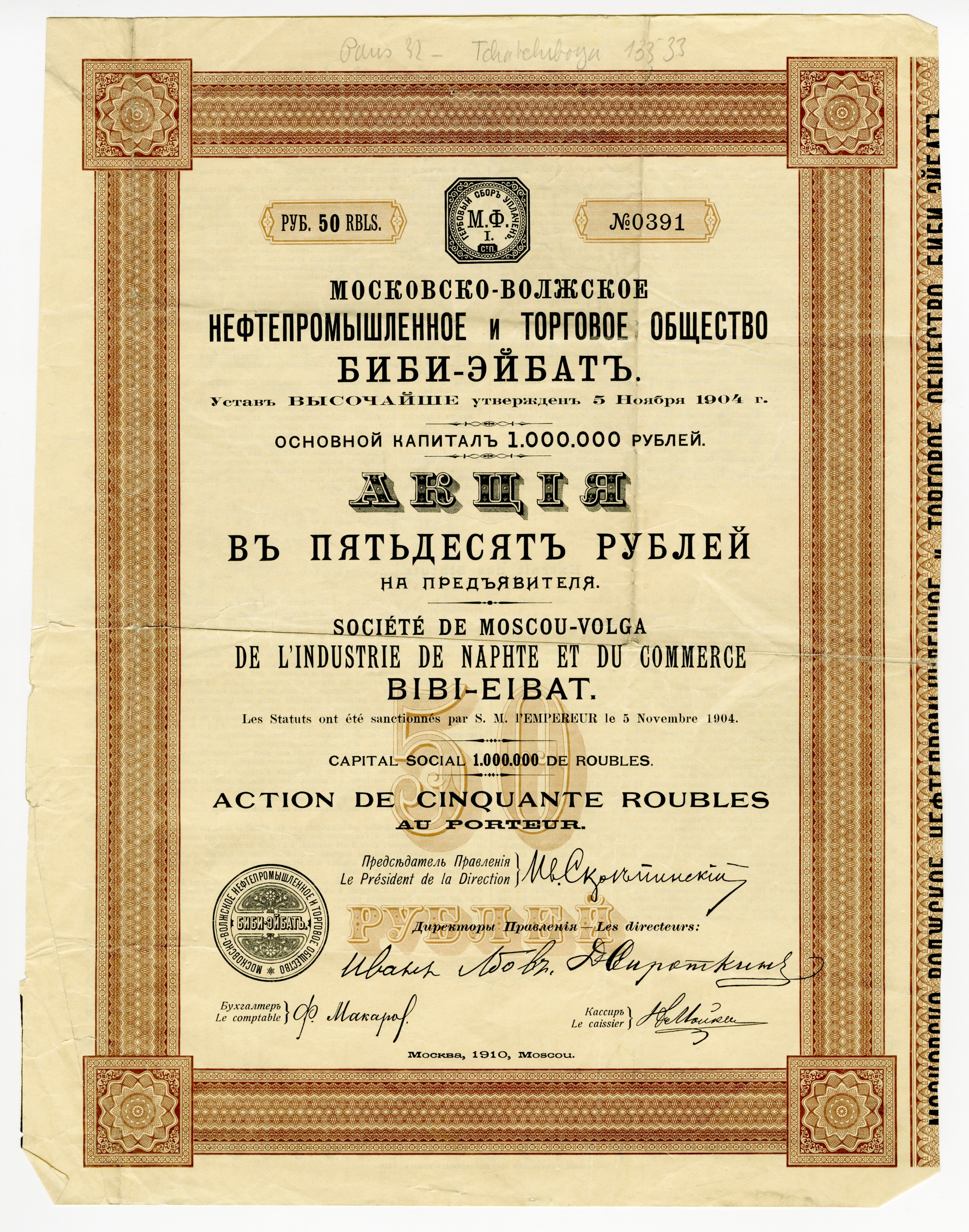 Акция в 50 рублей на предъявителя Московско-Волжского нефтепромышленного и торгового общества Биби-Эйбат, Москва, 1910 г.